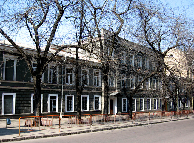 Ришельевский лицей в ОдессеРишельевский лицей, до 1989 - школа №36 с русским языком преподавания; первоначально, с 1862 года здание принадлежало Одесскому коммерческому училищу имени Николая I